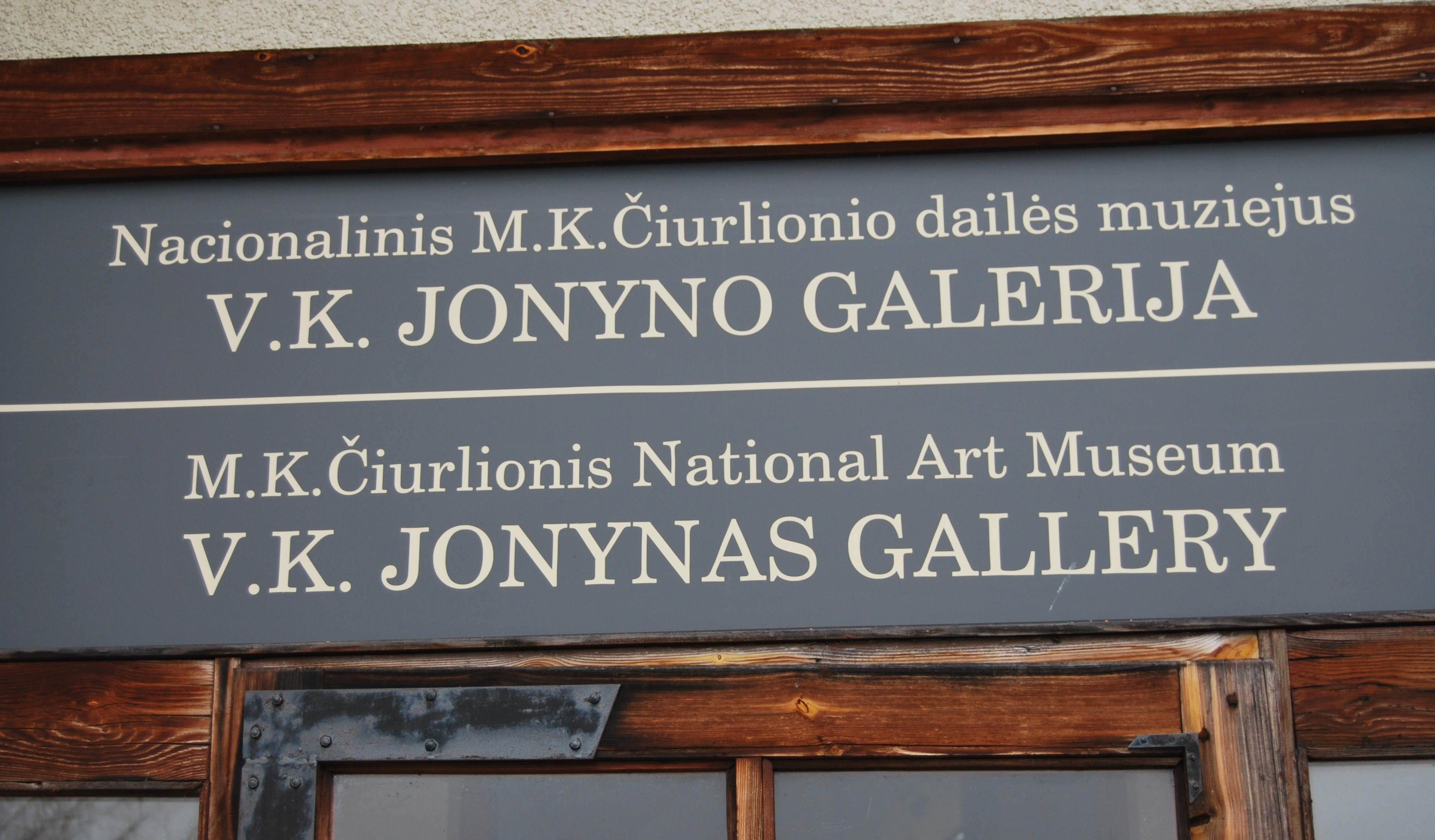 Galeria V. K. Jonynasa 2009 r.